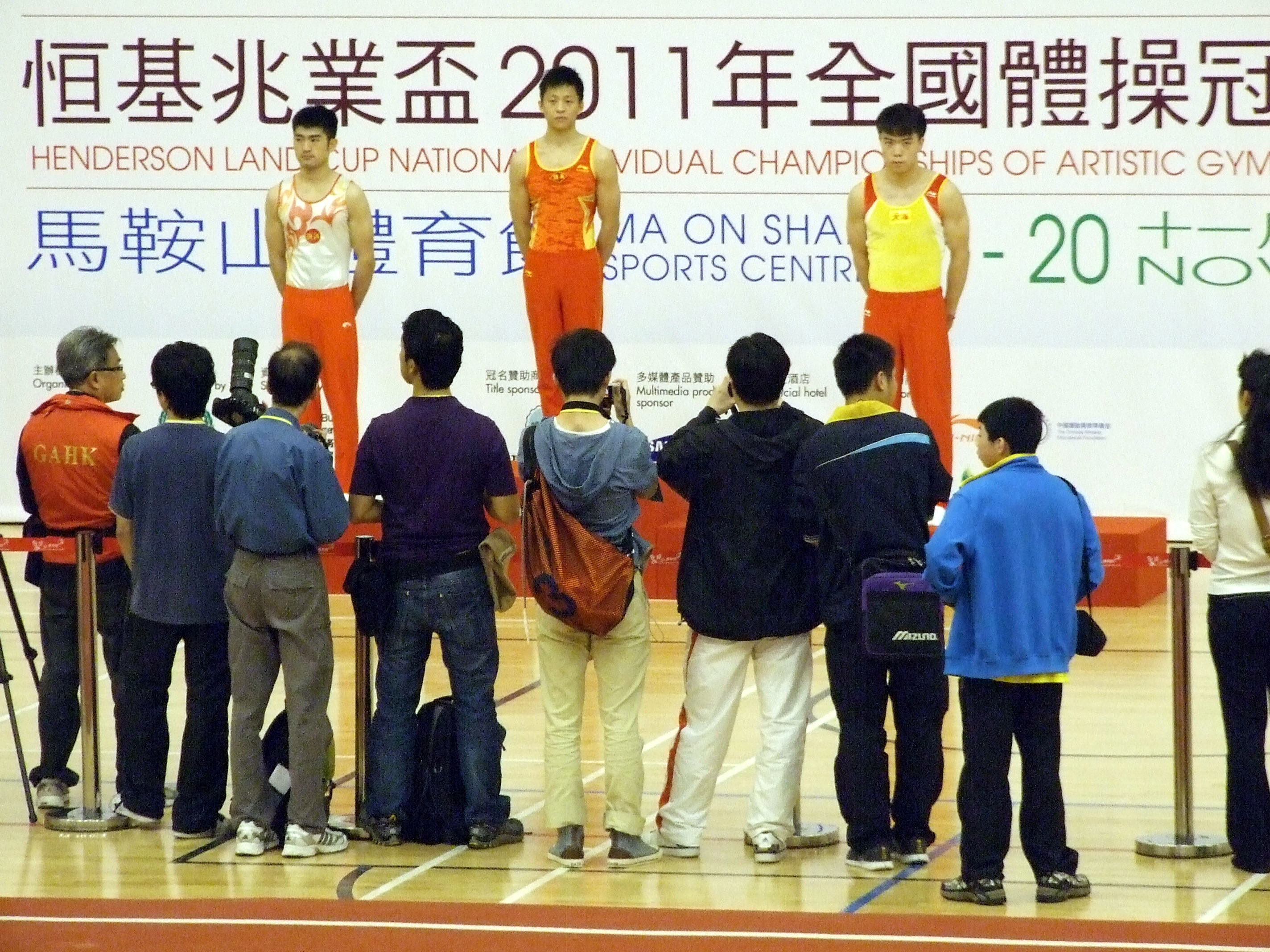 中文（香港）: 恒基兆業盃2011年全國體操冠軍賽鞍馬優勝者